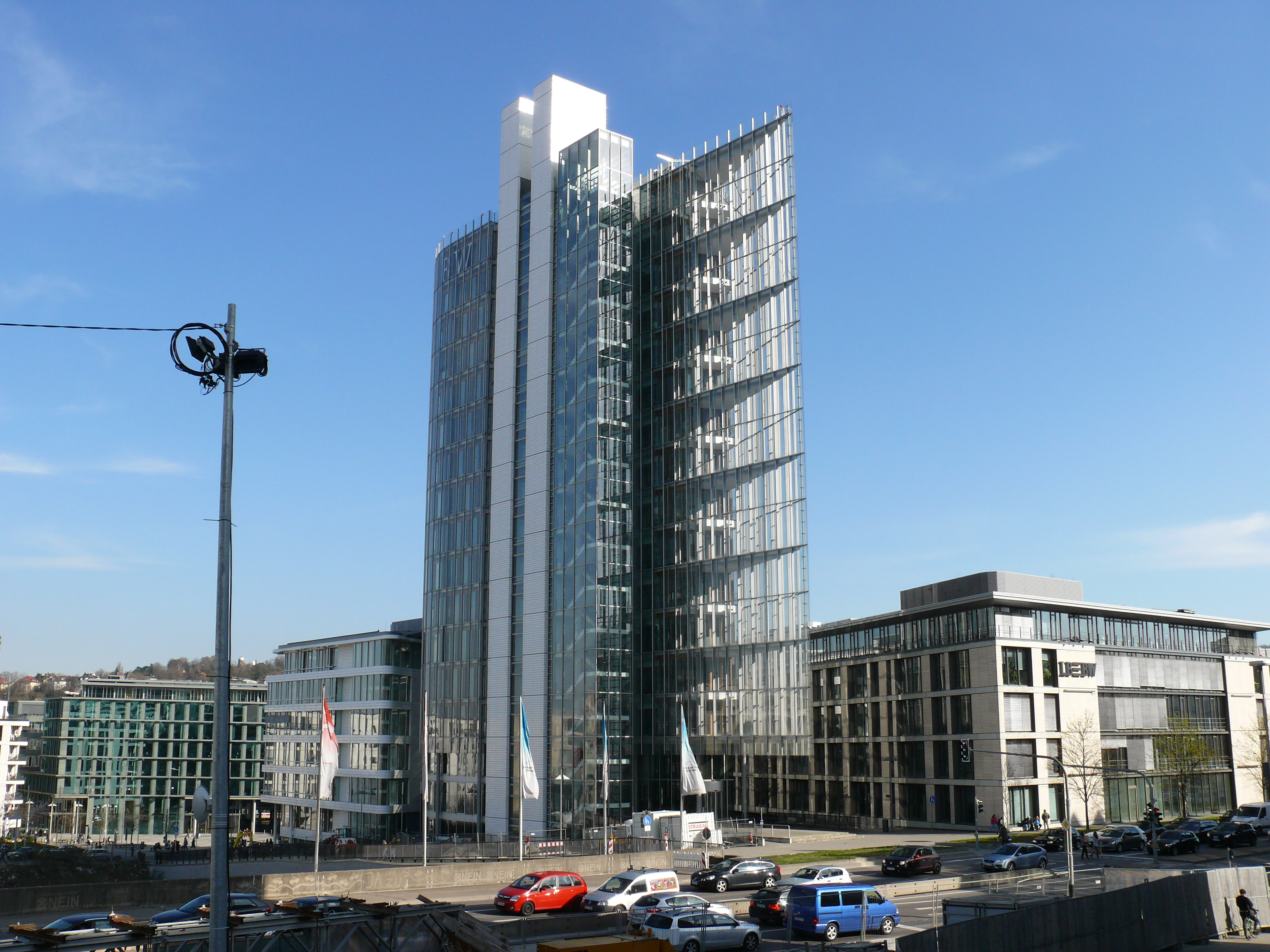 Das Hochhaus der LBBW im Stuttgarter Europaviertel.